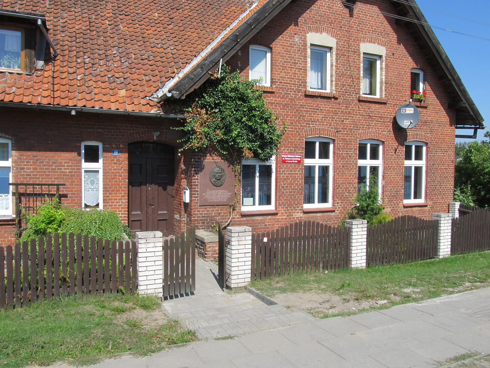 Poseł na Sejm w latach 1922/1935 - Piotr Szturmowski